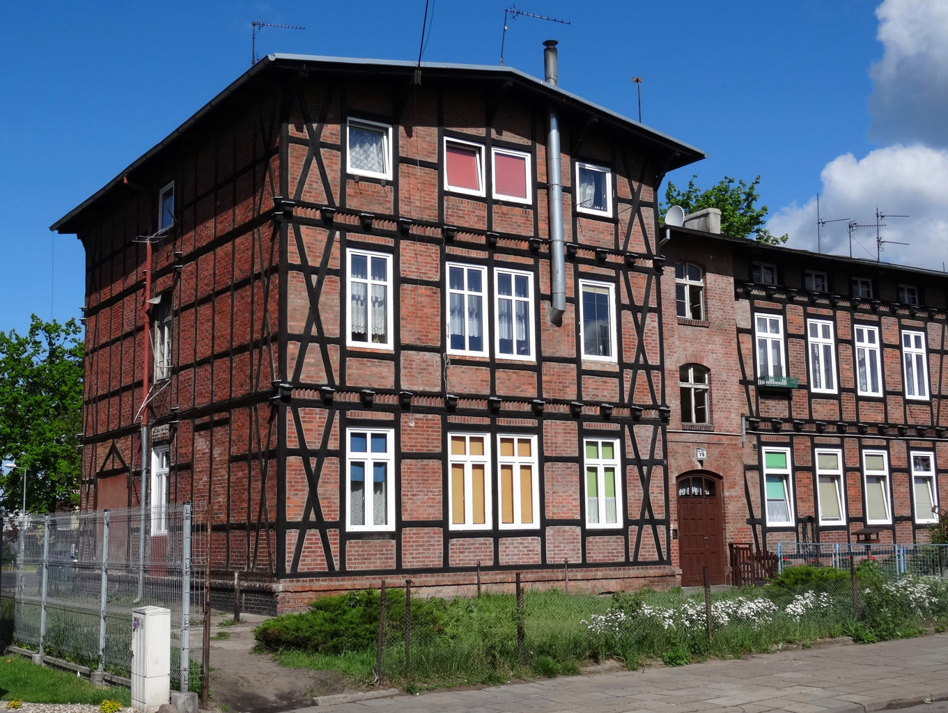 Osiedle Londynek (koszary wybudowane w latach 70. XIX w.) u wylotu ul. Pomorskiej w Bydgoszczy